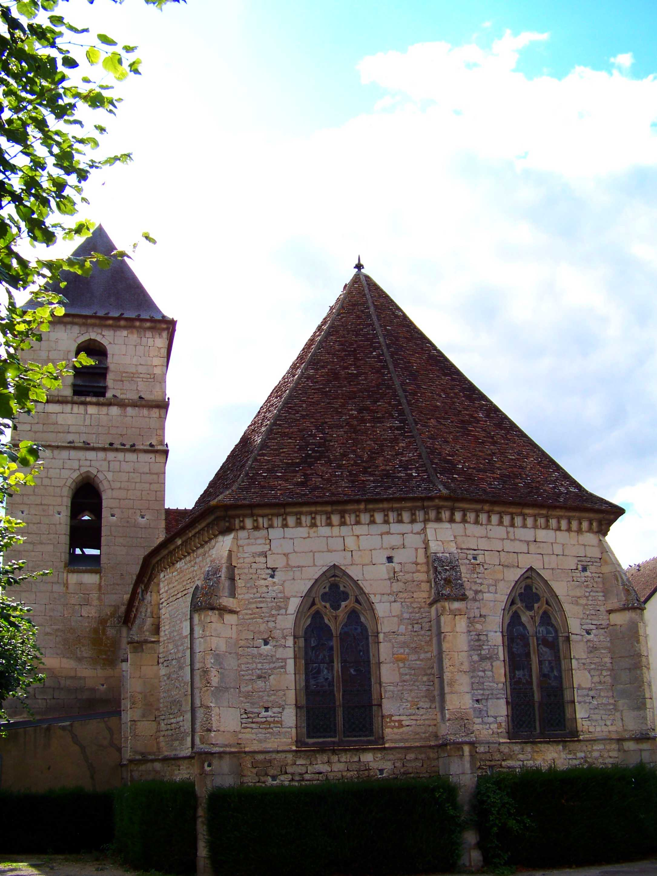 Église de Vincelles, chevet